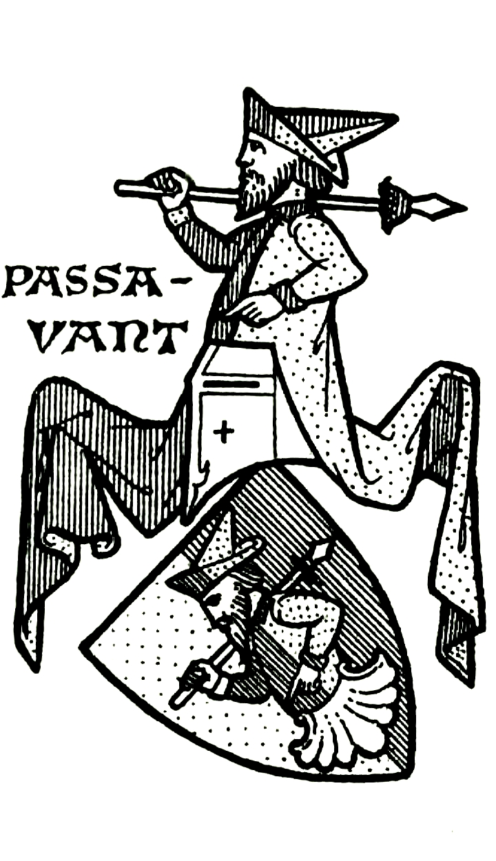 Stammwappen derer Passavant; reformierte, aus Frankreich über Basel in die Reichsstadt Frankfurt eingewanderte Kaufmannsfamilie